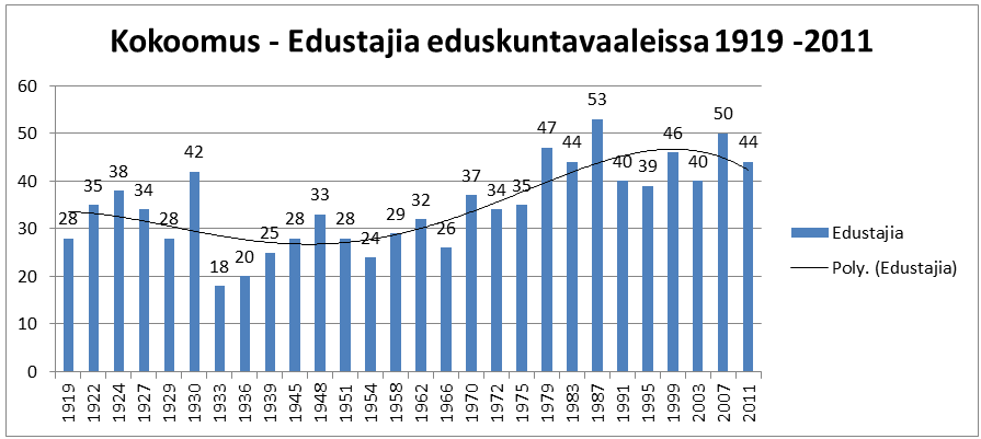 Kokoomuksen kannatus eduskuntavaaleissa 1919-2011